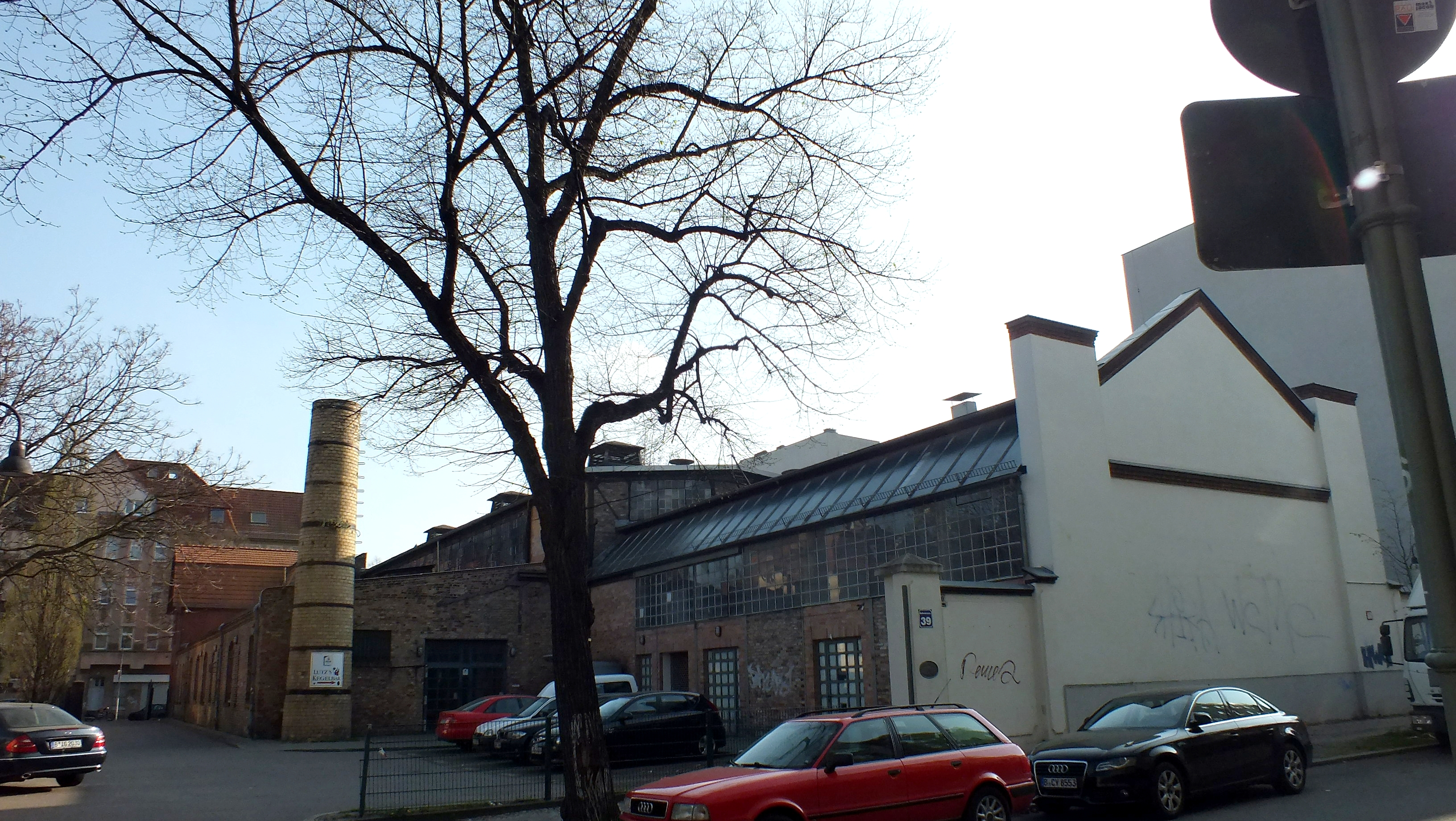 Das Gelände des ehemaligen Eisenwerk Franz Weeren befindet sich in Berlin-Neukölln in der Glasower Straße 27 – 28. Die dazugehörige Fabrikantenvilla befindet sich in der Delbrückstraße 39. Beide stehen seit 1985 unter Denkmalschutz. In der ehemaligen Villa befindet sich derzeit das Brauhaus Rixdorf